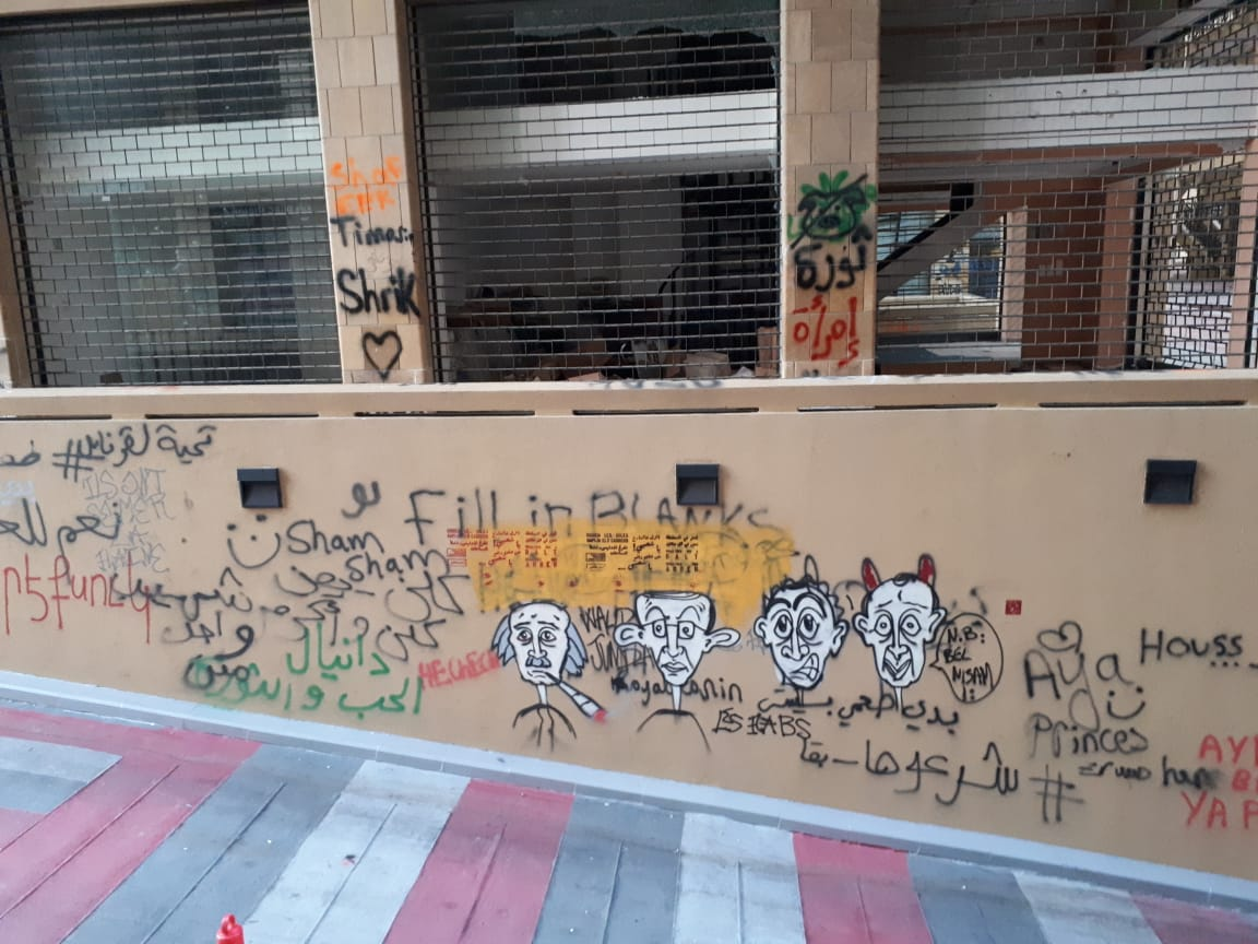 Graffitis in der Innenstadt von Beirut während der Proteste im Libanon